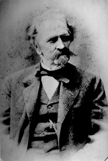 Alexander Friedrich Wilhelm von Württemberg (1804–1881)